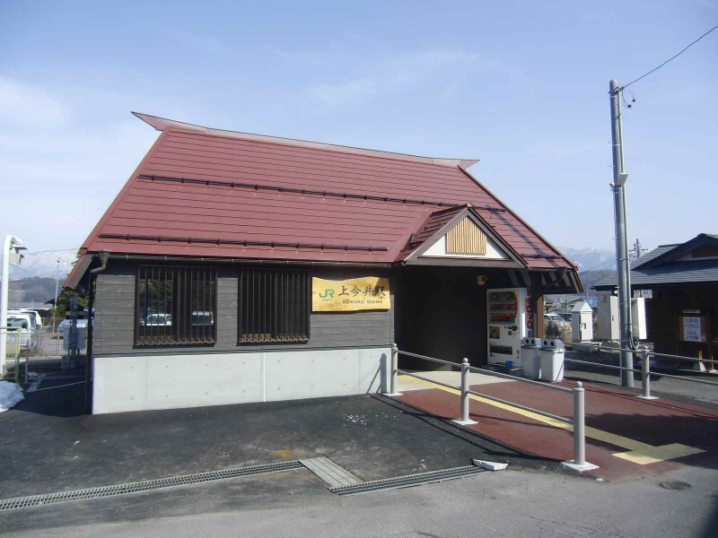 上今井駅新駅舎の写真です。